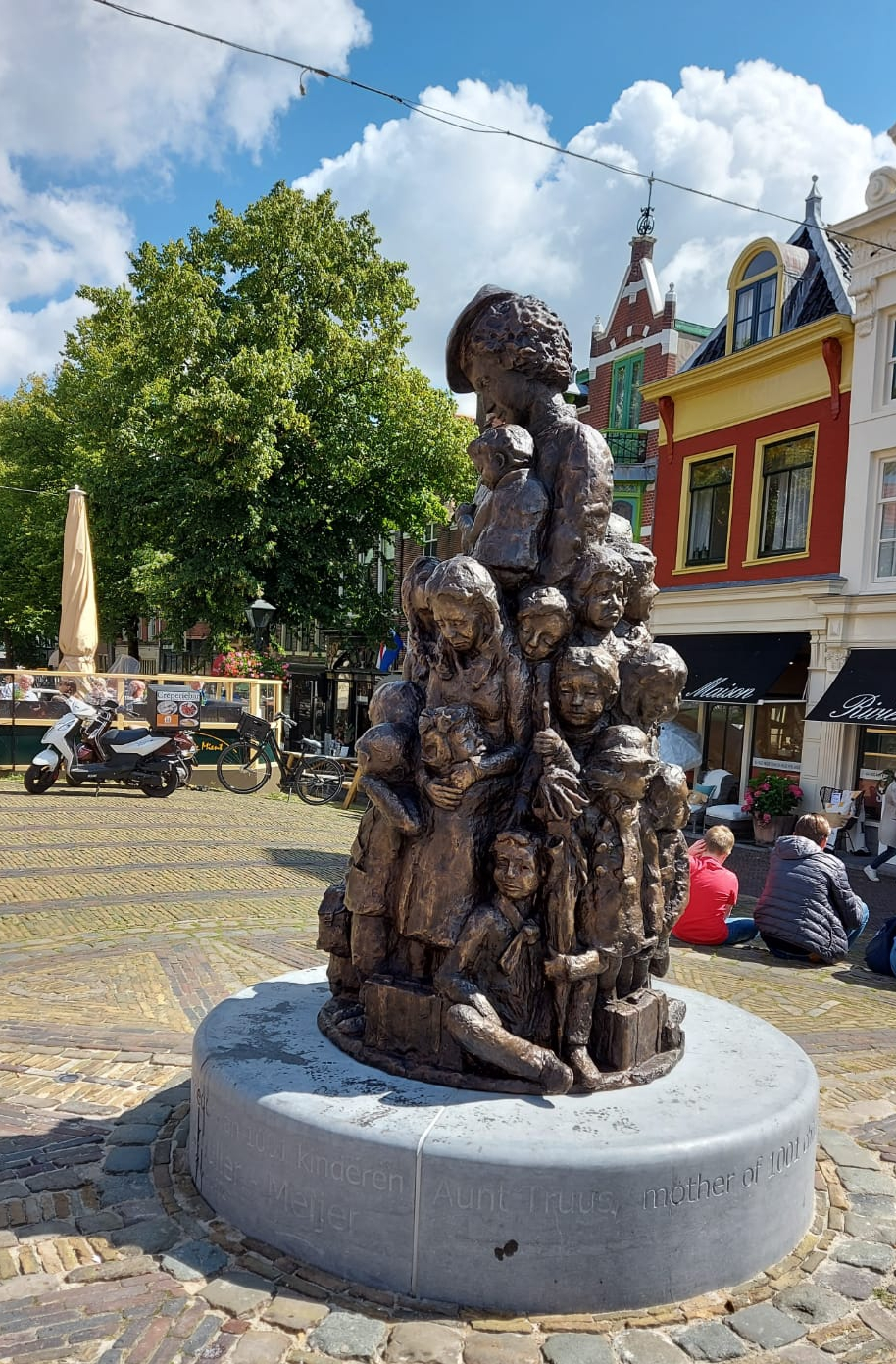 Standbeeld van Truus Wijsmuller-Meijer, omringd door kinderen, geplaatst op 01-07-2020. Een initiatief van de Hist. Vereniging Alkmaar. Gemaakt door Annet ter Berg-Pompe en Lea Wijnhoven